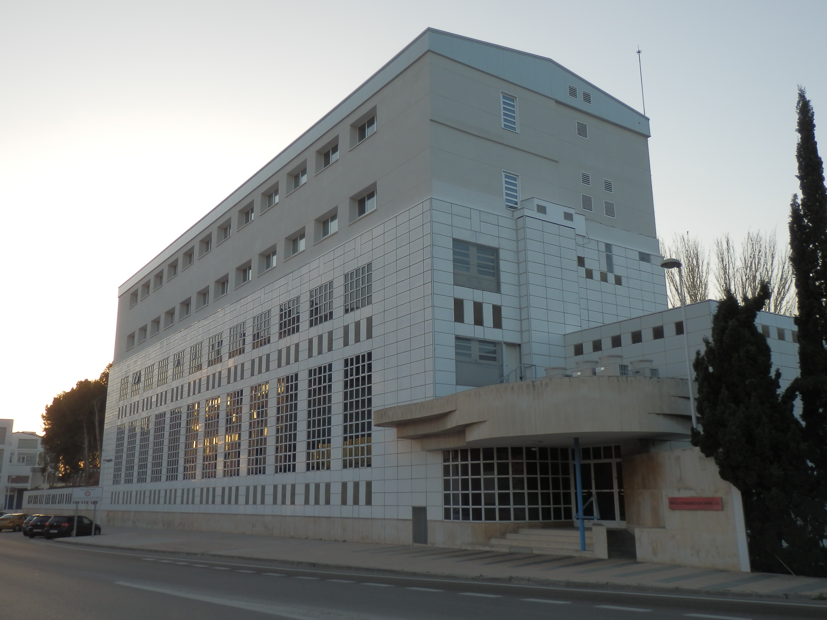 Fábrica de Balay en Montañana, Zaragoza. Situada en la Avenida de la Industria, 49, Zaragoza. Construida en 1966 por Regino Borobio Ojeda y José Borobio Ojeda.